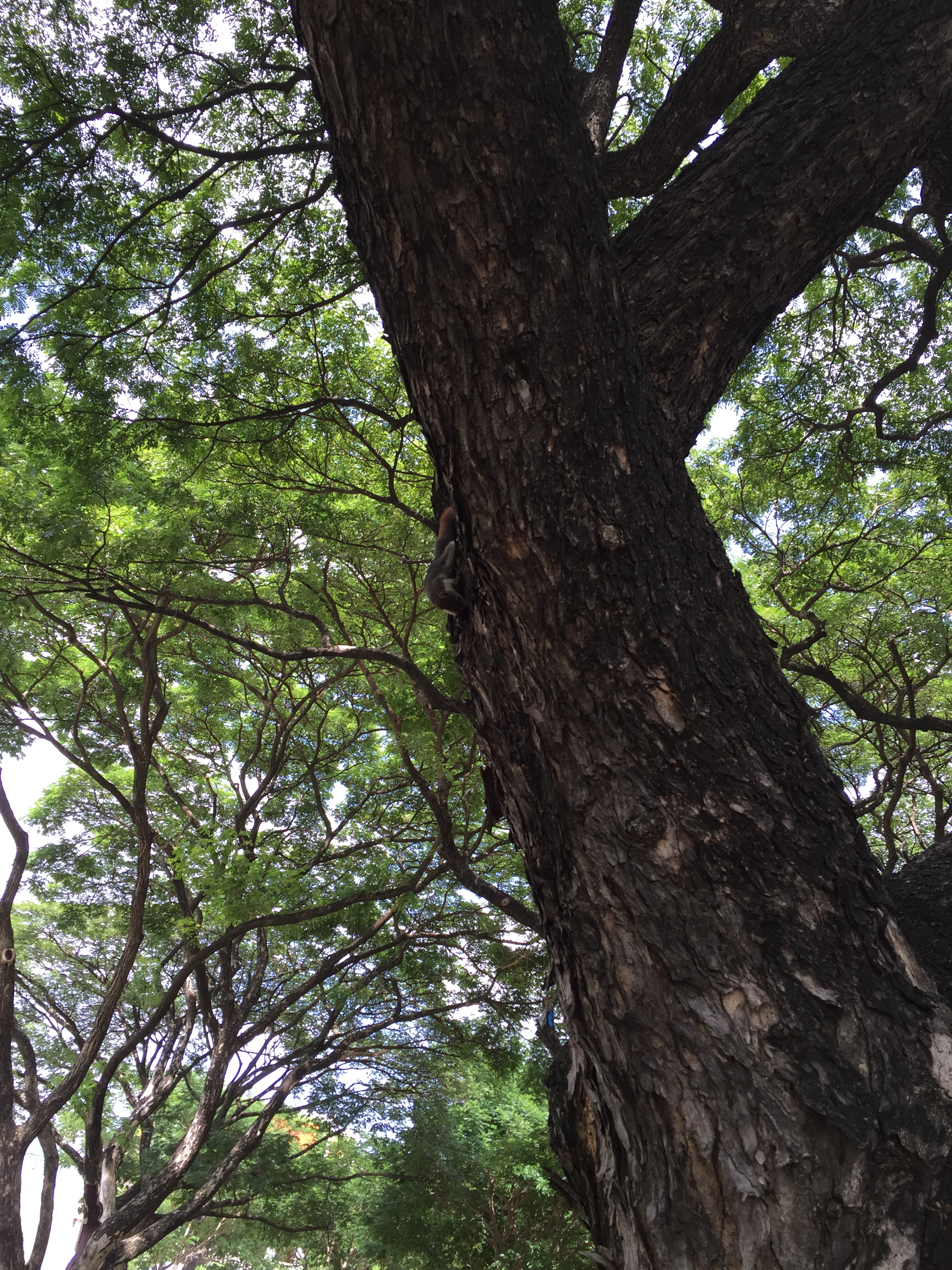 ต้นจามจุรีเป็นต้นไม้ประจำจุฬาลงกรณ์มหาวิทยาลัย ต้นในภาพเป็นต้นจามจุรีพระราชทานในพระบาทสมเด็จพระเจ้าอยู่หัวรัชกาลที่ 9 ฝั่งลานจามจุรีต้นด้านหน้าหอประชุมจุฬาฯ มากที่สุด